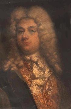 Portrait of Francesco Bernardi (1686-1758), detto Senesino